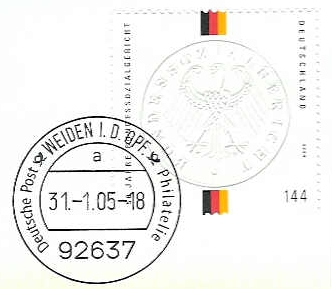 Bildbeschreibung: Das Bild zeigt die am 9.9.2004 erschienene Briefmarke ("50 Jahre Bundessozialgericht") Die Marke wurde im Prägedruck hergestellt. Quelle: Original-Briefmarke Fotograf/Zeichner: unbekannt Datum: eingescannt und entwertet am 18.6.2006 durch RedPiranha Sonstiges